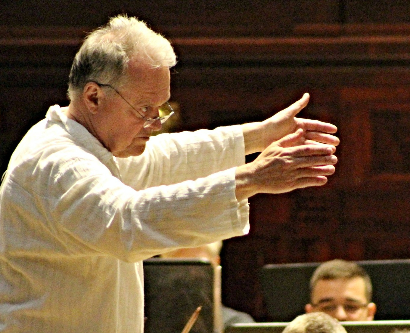 Orchestrální zkouška Dvořákova oratoria Stabat mater ve Smetanově síni Obecního domu v Praze